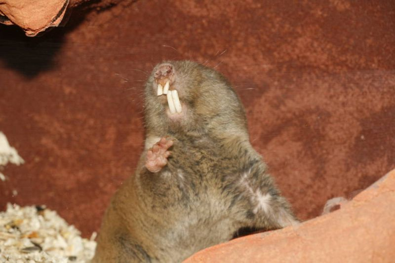 Graumull im Unterirdischen Zoo Osnabrück.